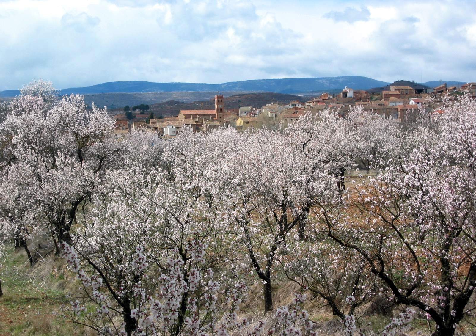 Vista general de Torrebaja (Valencia), desde el Otro Lado, con detalle de almendros en flor.